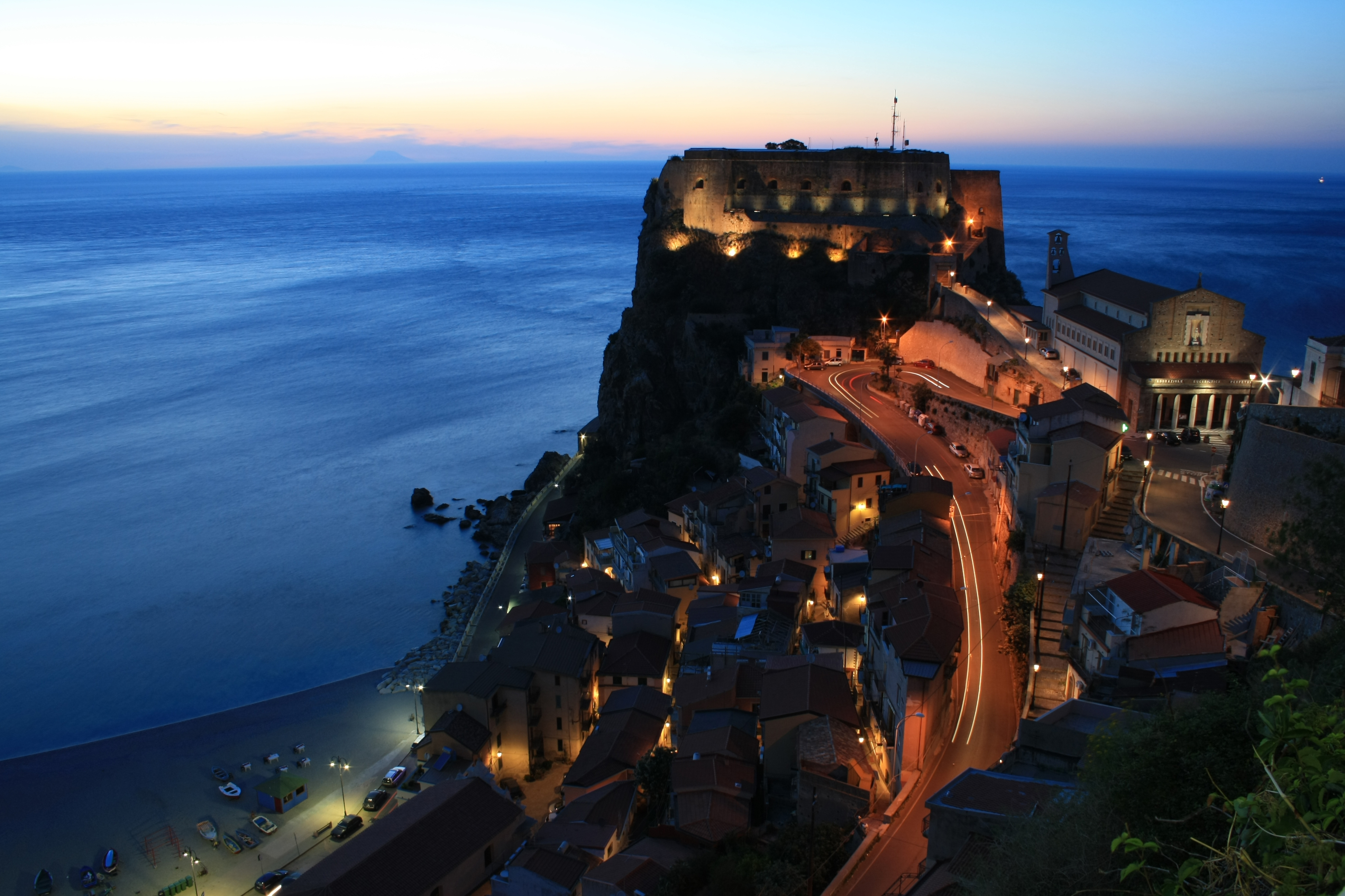 Castello Ruffo a Scilla (Italy).